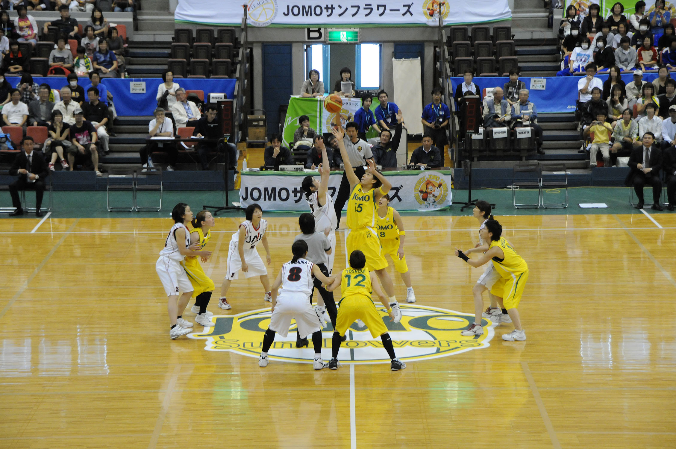 WJBL 09-10レギュラーリーグ、JOMO対JAL。船橋アリーナで。